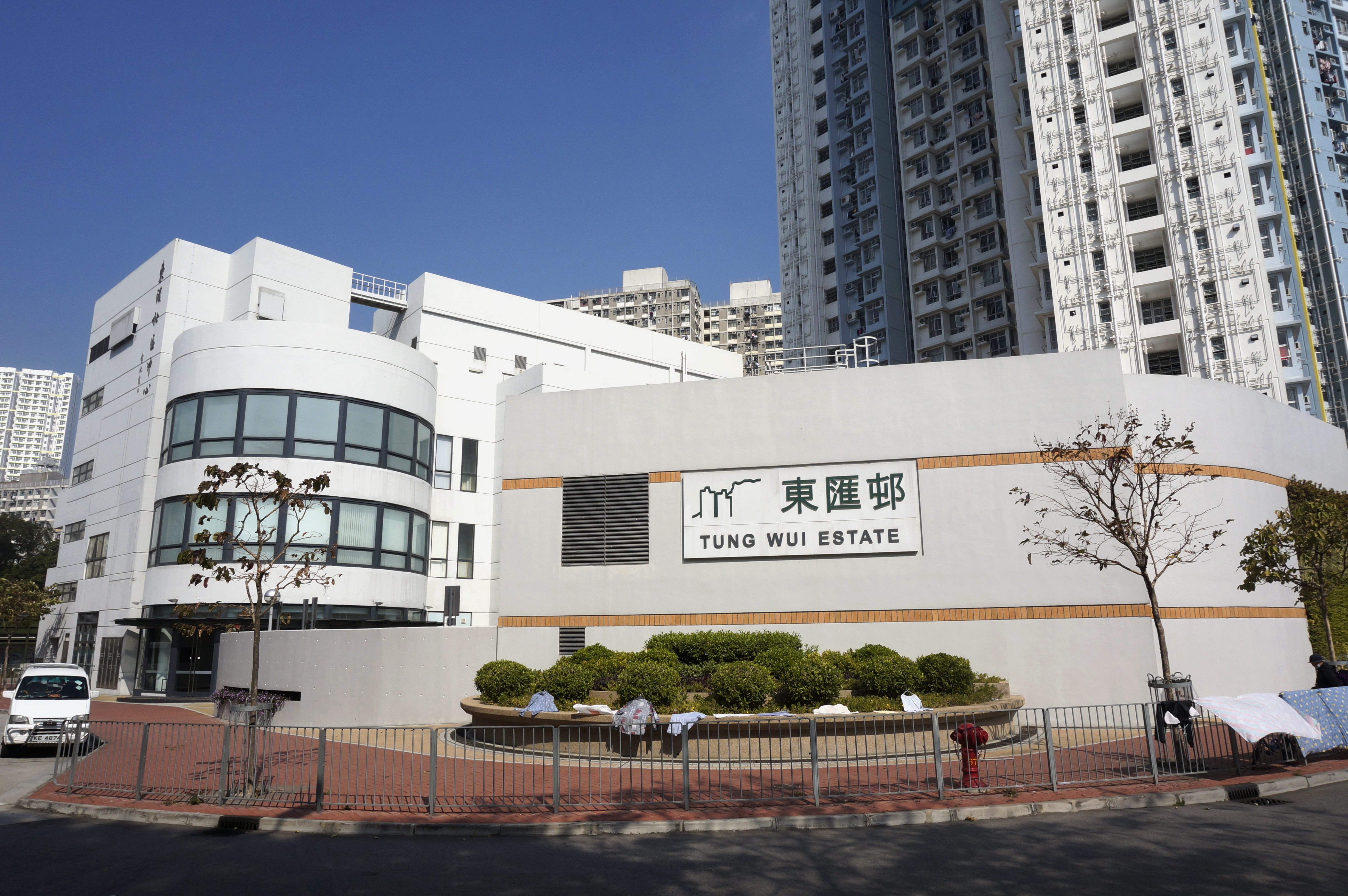 東匯邨的牌坊